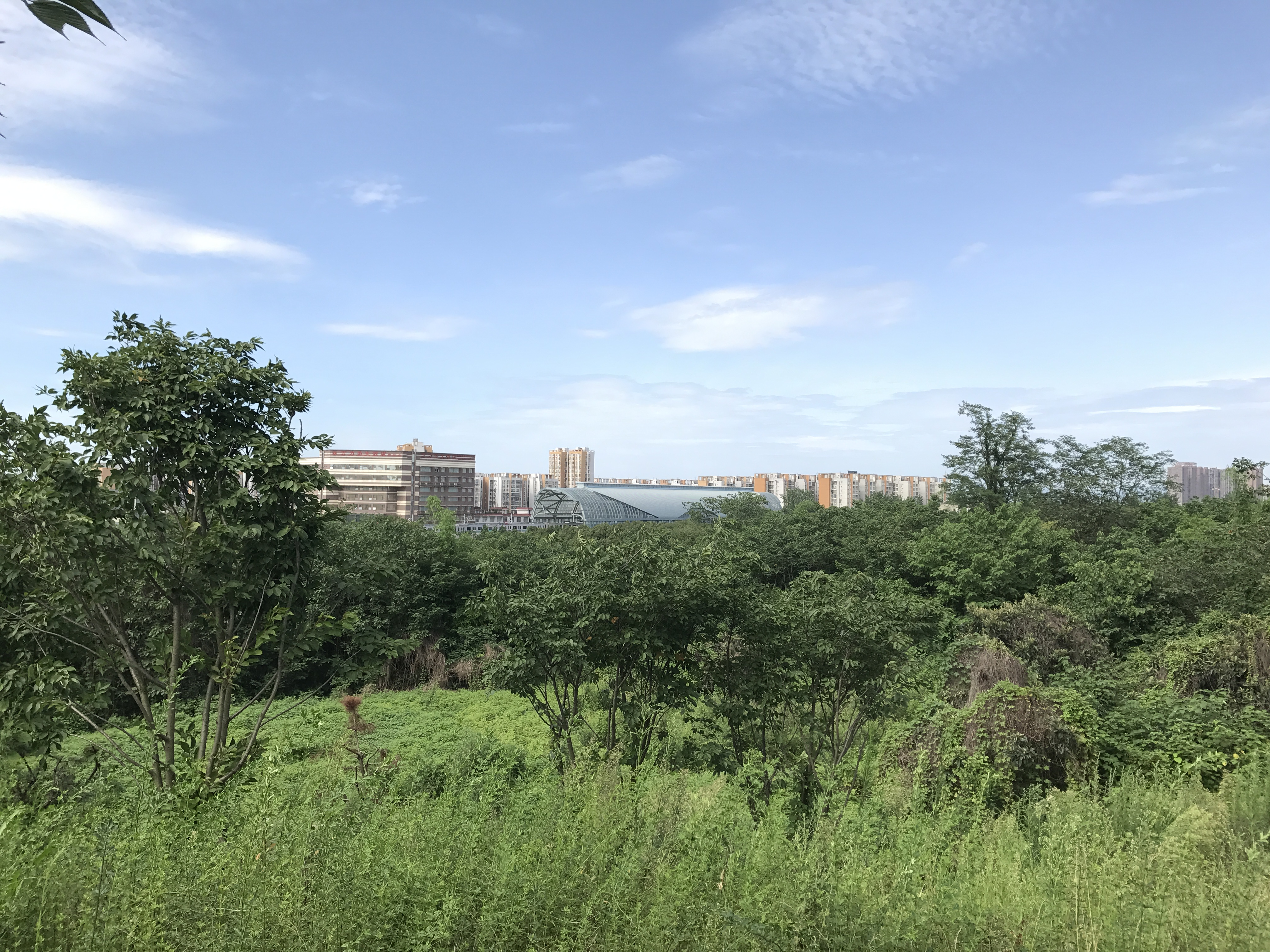 从青龙湖远眺明蜀王陵站